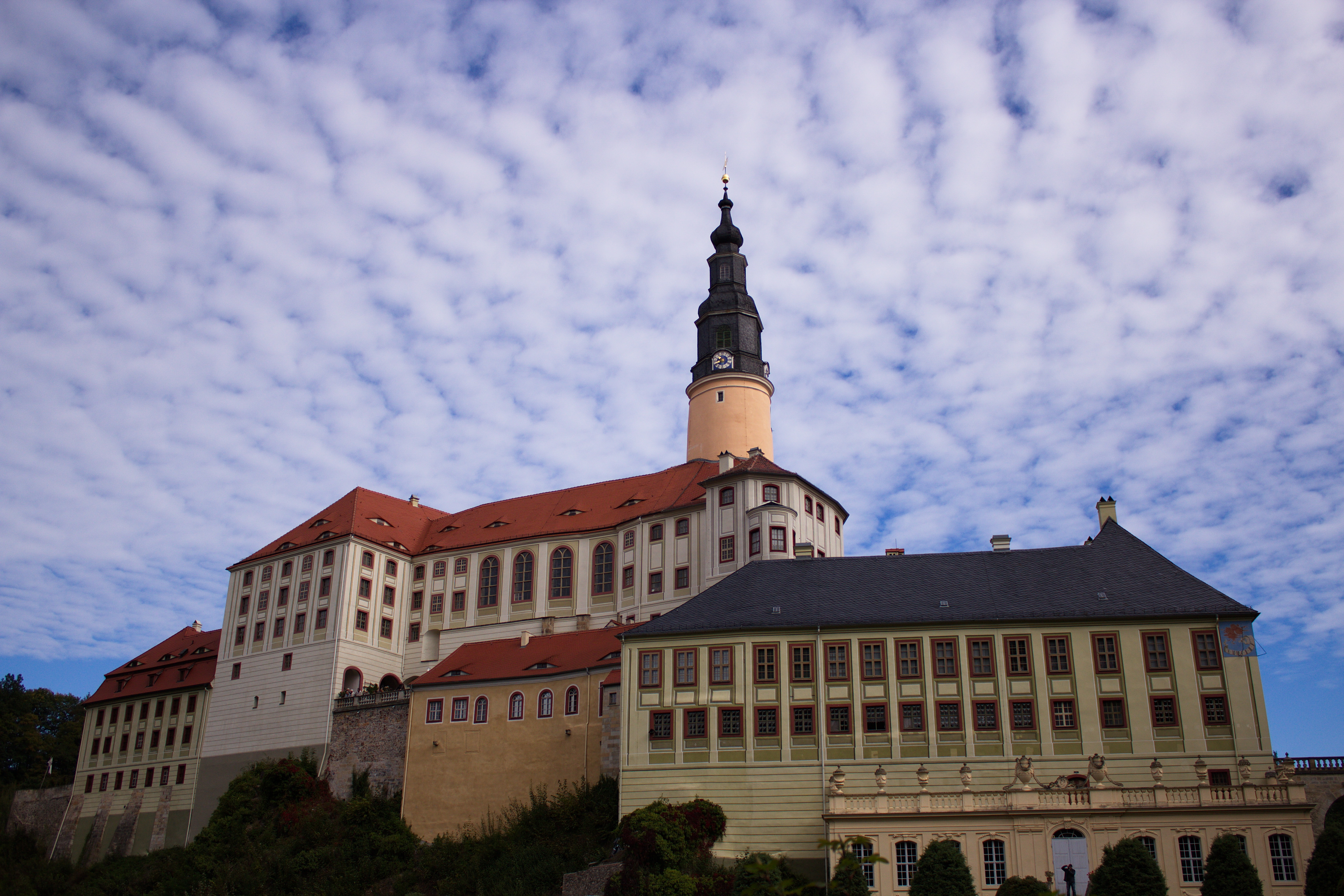 Das Schloss Weesenstein vom Eingang des Parkes aus aufgenommen. Man kann sehr gut die Fenster erkennen, die wie Augen aussehen.